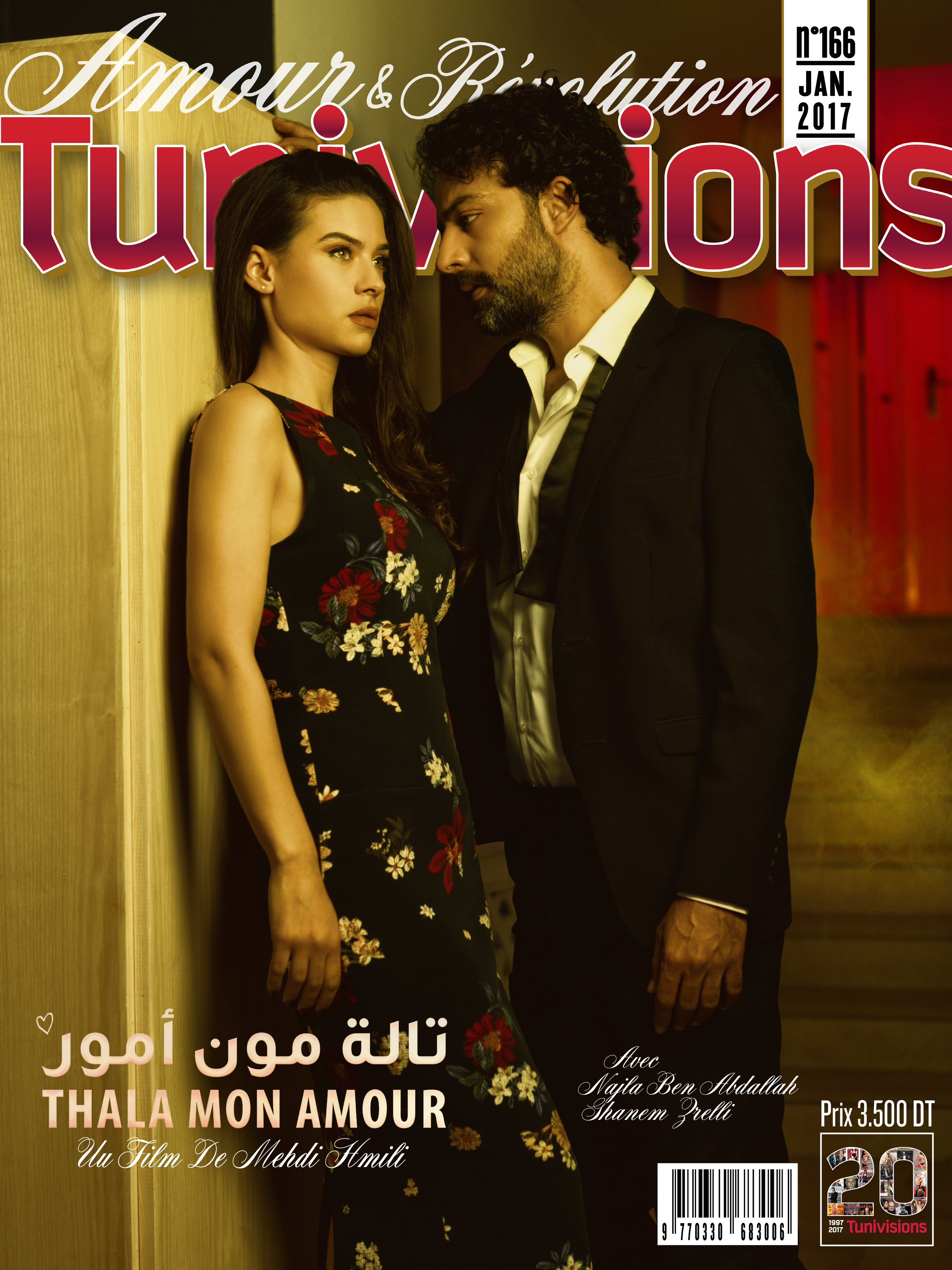 Couverture du numéro 166 du magazine tunisien Tunivisions.